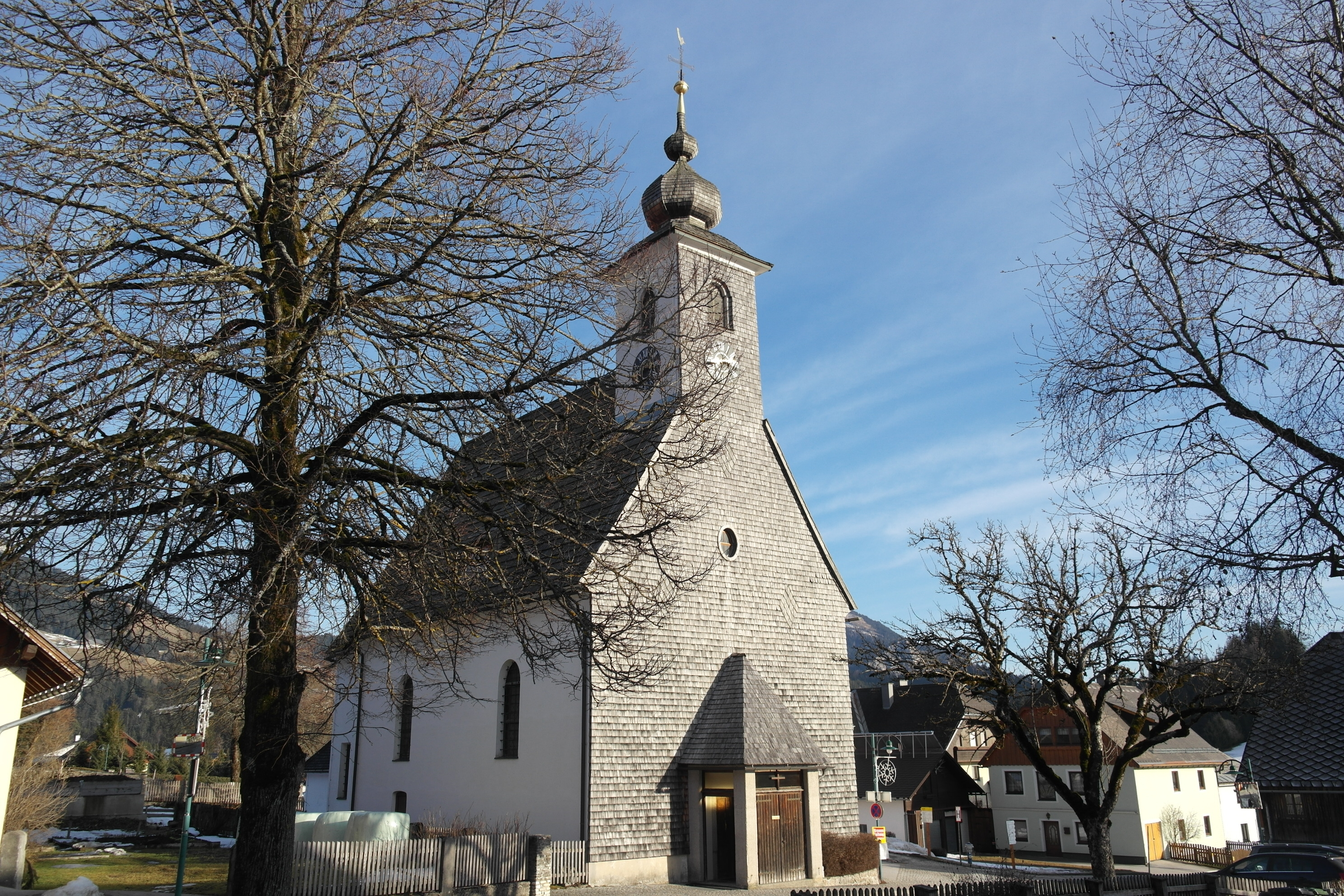 denkmalgeschützte Kirche in Tauplitz